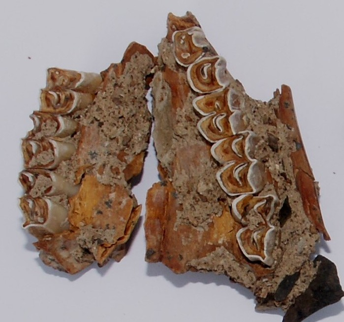 Archaeozoology עצמות בעלי חיים שנמצא בחפירה ארכאולוגית פרהיסטורית לסת עליונה של צבי ממערת מיסליה (פליאולית תיכון), כ- 200,000 שנה לפני זמננו